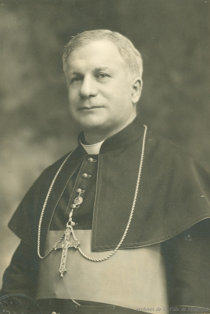 Portrait de Mgr Joseph-Jean-Baptiste Hallé, évêque de Pétrée